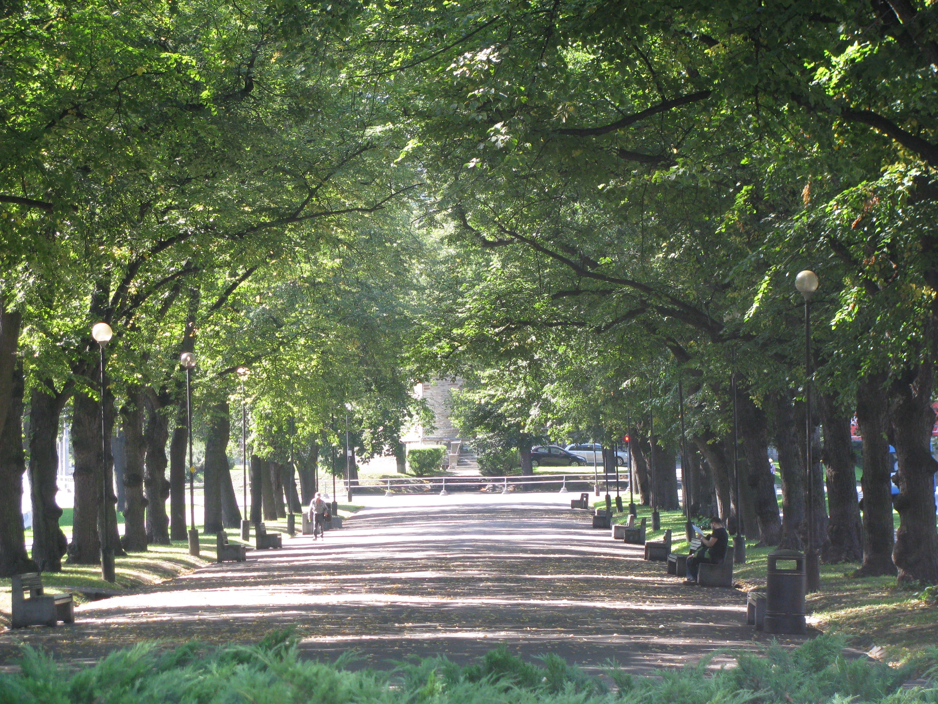 Allee Kaarli puiesteel Tallinnas.